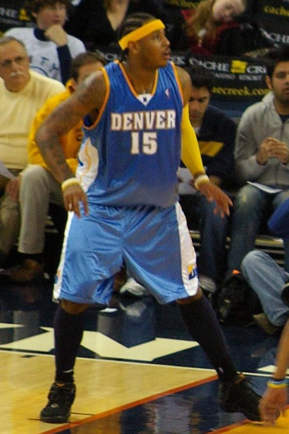 Denver vs Golden State